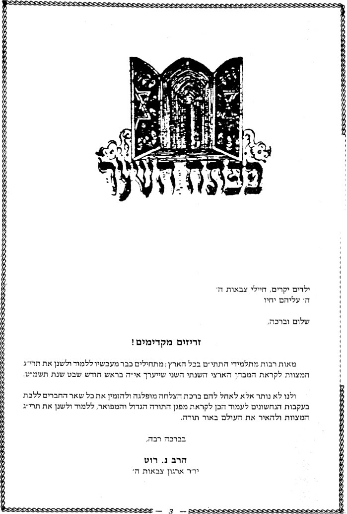 תמונה מחוברת של מחלקת צ"ה של צא"ח, צולם על ידי